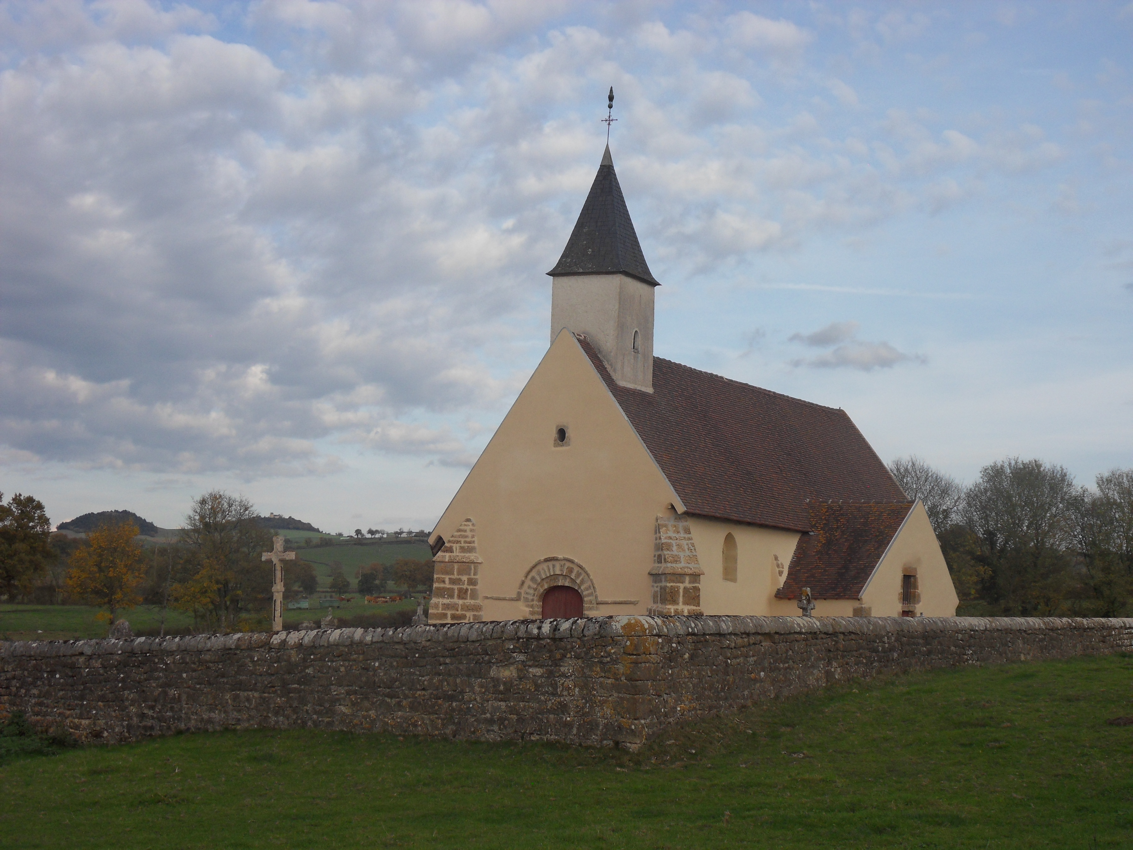 église paroissiale Notre Dame datée du XIII è siècle et augmentée au XVI è siècle de chapelles formant la croix.